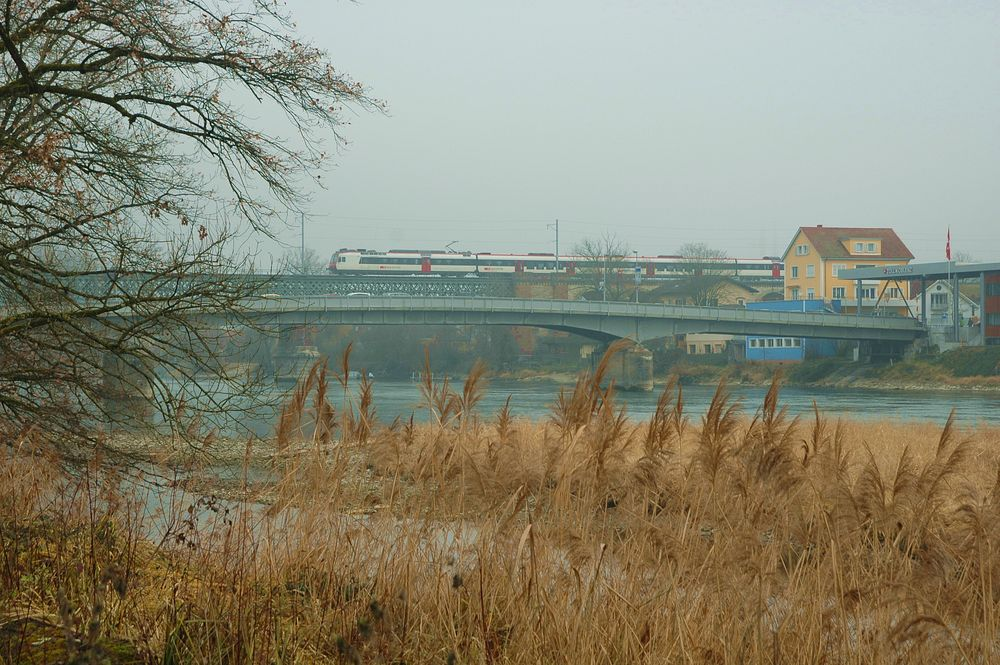 Die Straßenbrücke Waldshut-Koblenz im Januar 2014; dahinter die Eisenbahnbrücke